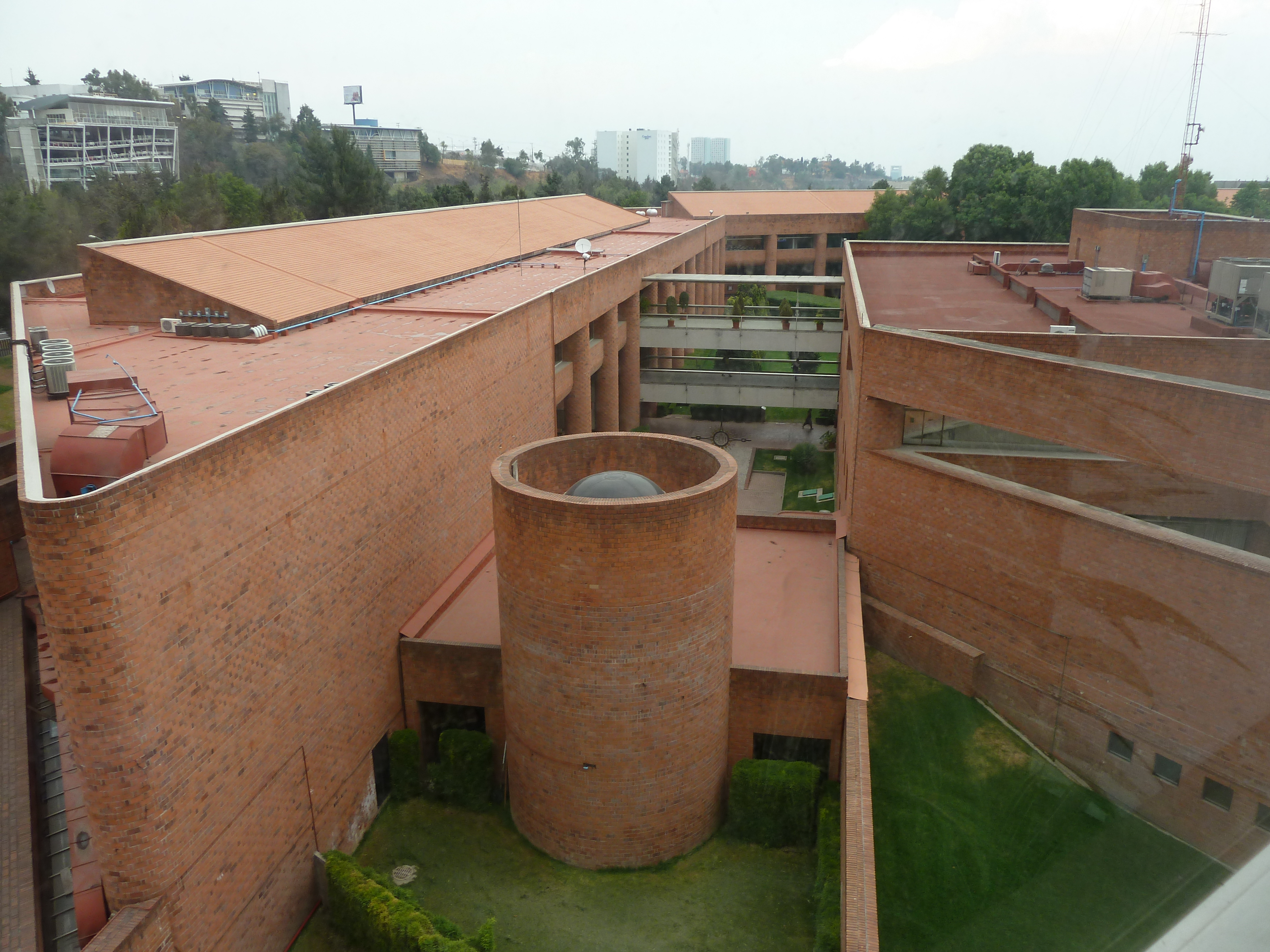 Universidad Iberoamericana, Sede Mexico Santa Fe, edificio Gris visto desde edificio Café